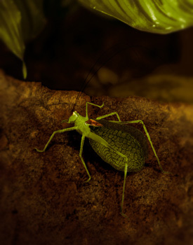 Representação artística de um Tananá (Thliboscelus hypericifolius), raro inseto da fauna brasileira. Não existem fotografias de um exemplar vivo na natureza, apenas de exemplares capturados e preservados em museus. Fiz esta ilustração inspirando-me em uma ilustração a traço feita por Henry W. Bates e publicada em 1863 em seu livro " The Naturalist on the River Amazons".